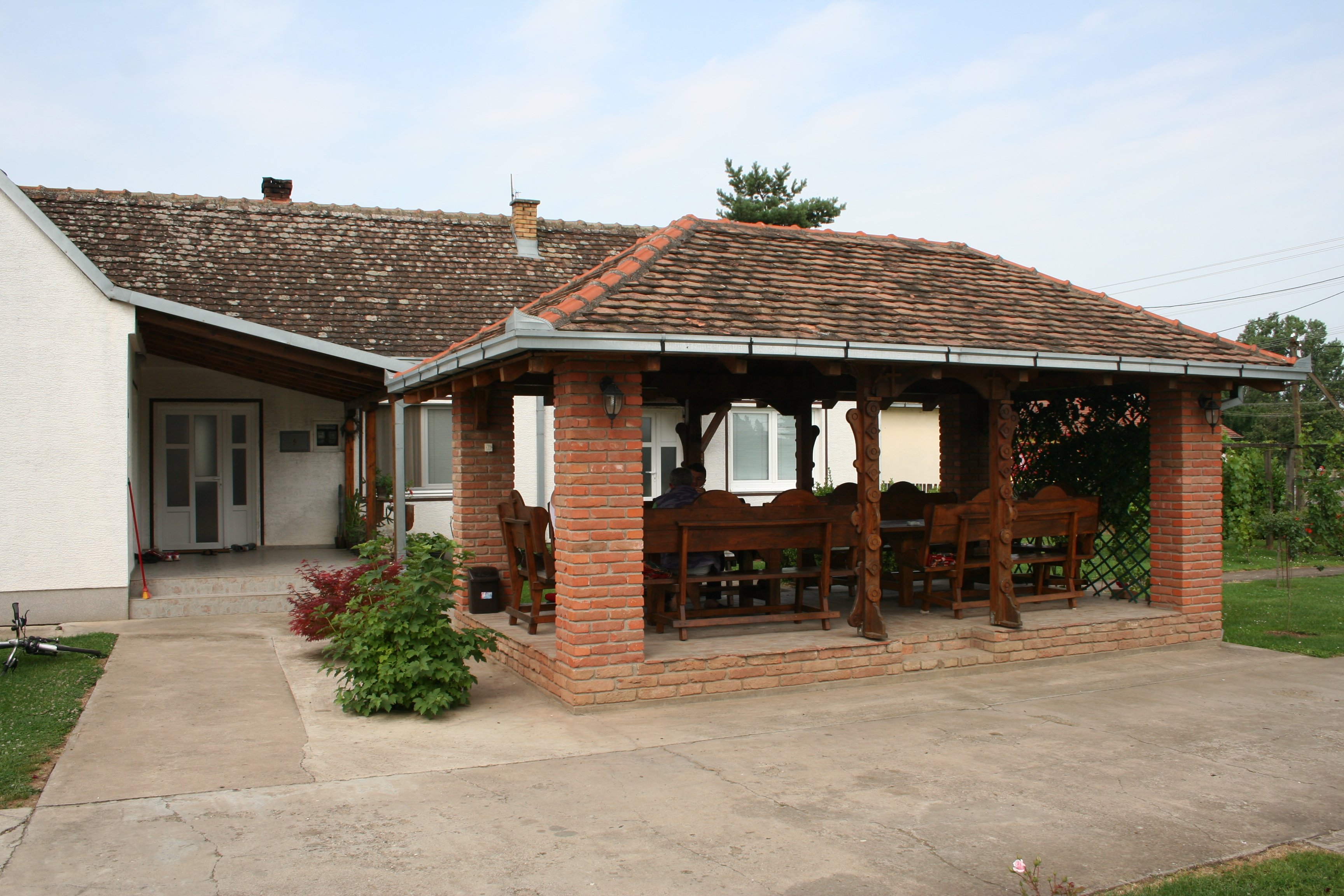 Crkva Svete Trojice u Zasavici II